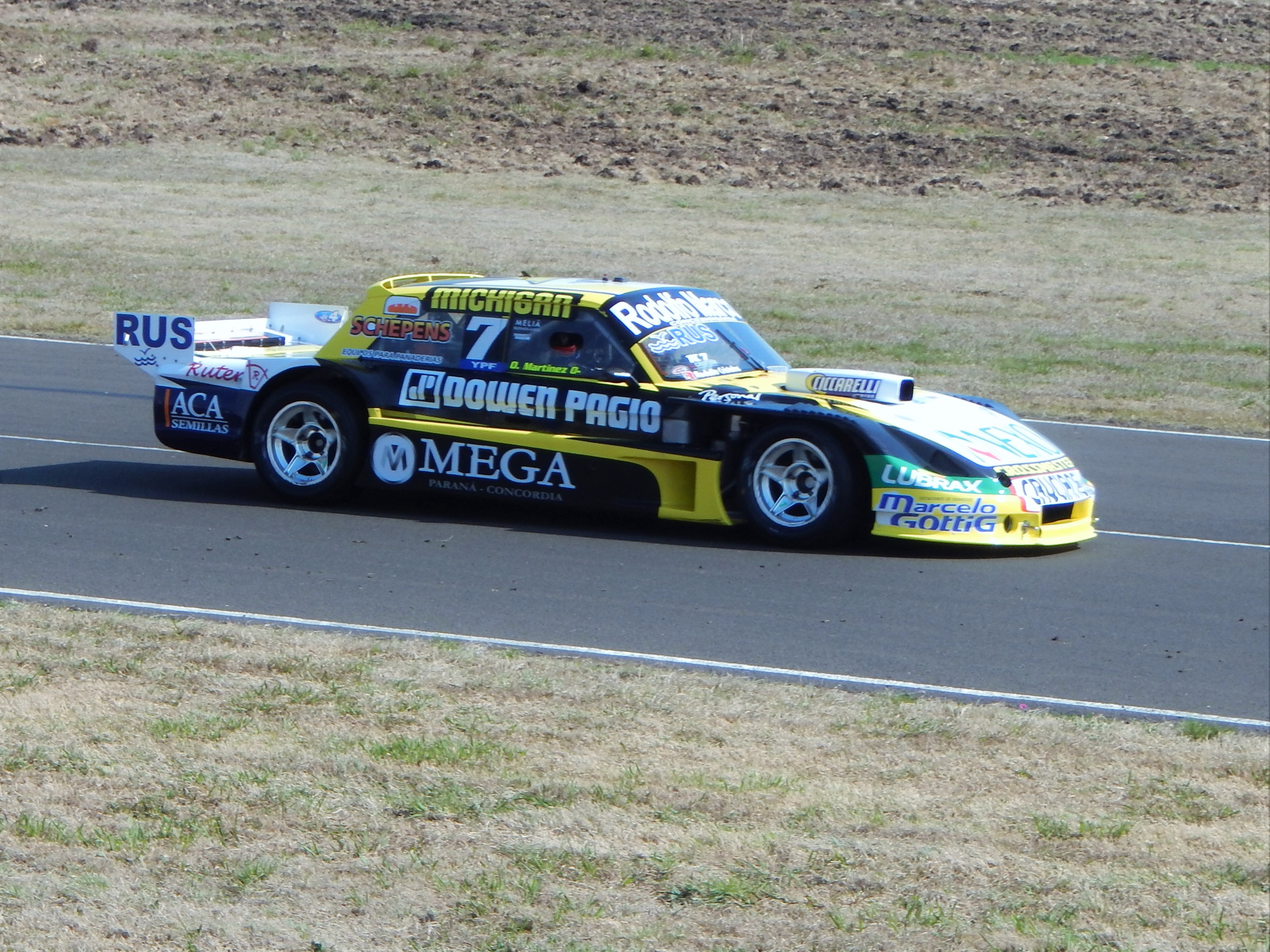 Omar "Gurí" Martínez Paraná 2015